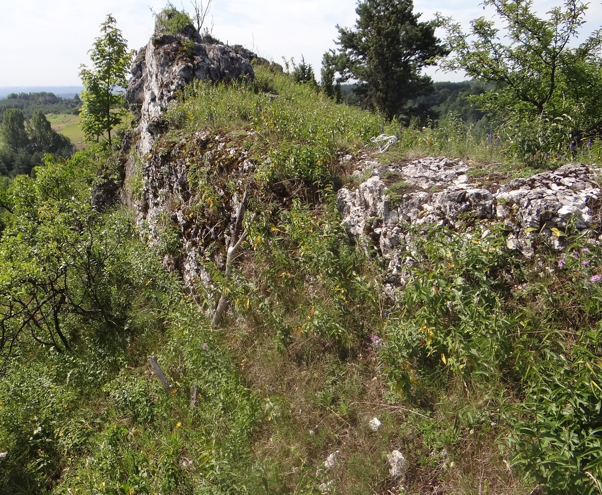 Skały na wzgórzu Łysa Pałka w Ryczowie